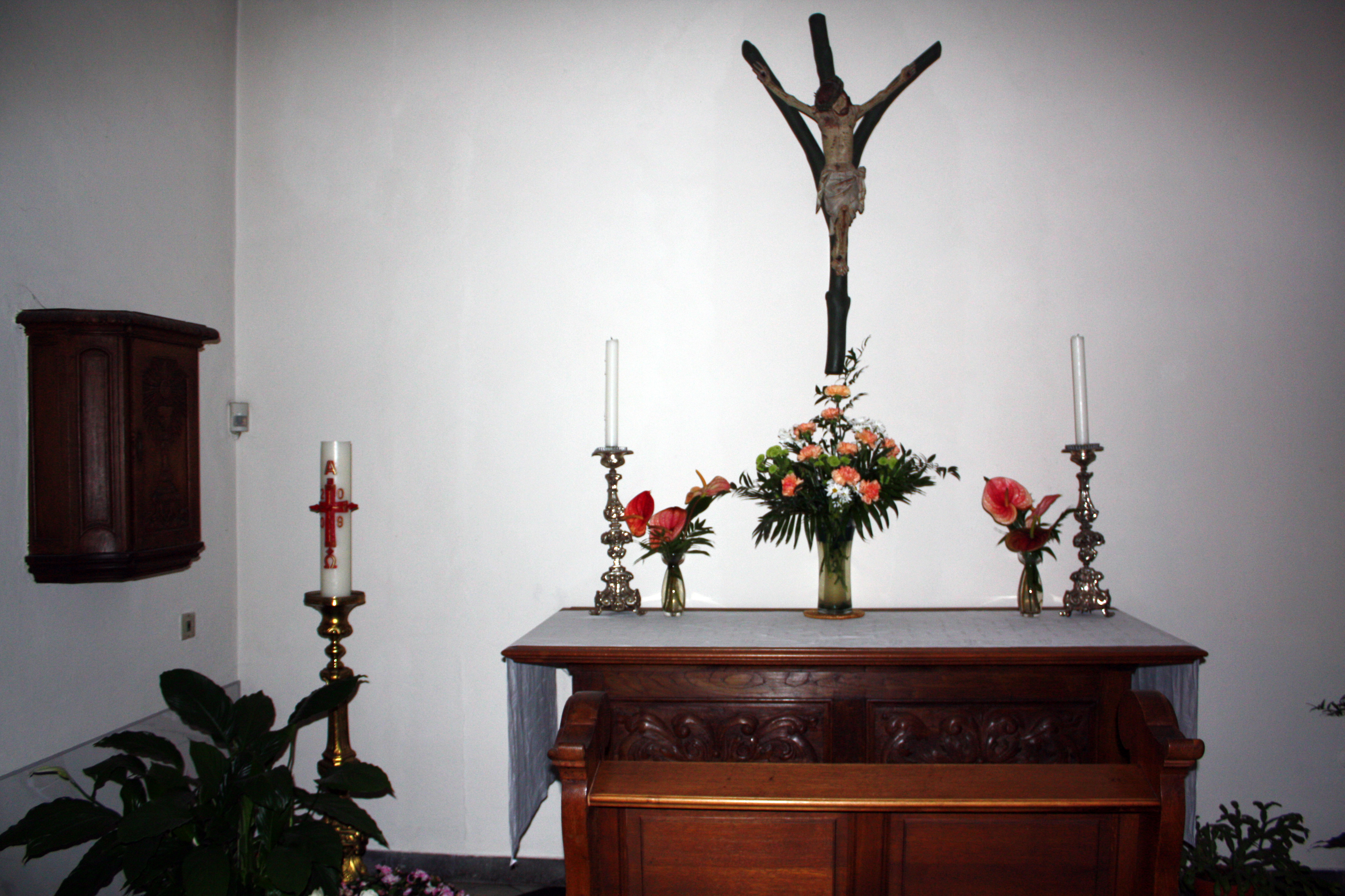 Köln, St. Maria in der Kupfergasse. Gabelkreuz im Seitenschiff